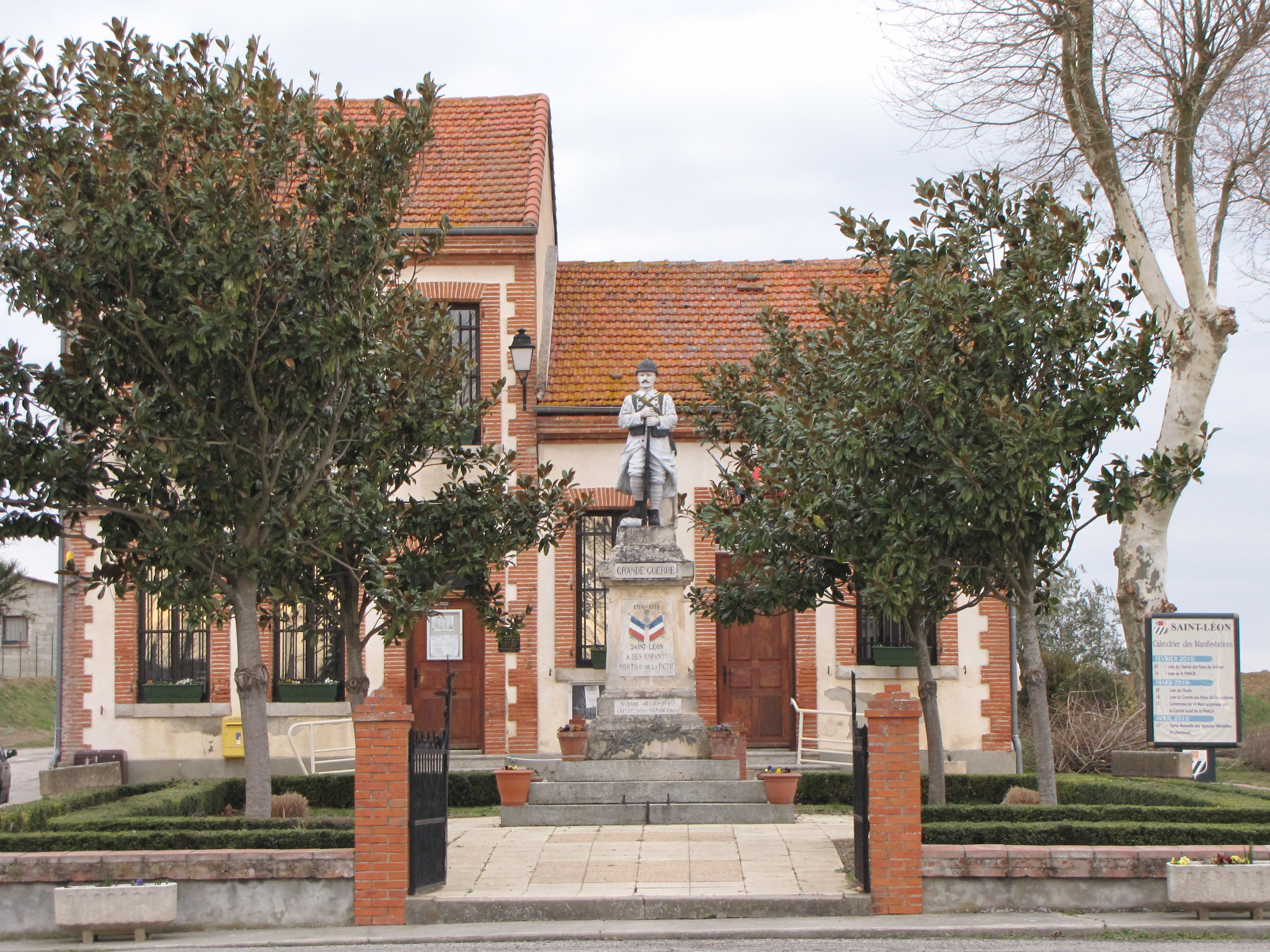 Mairie de Saint-Léon